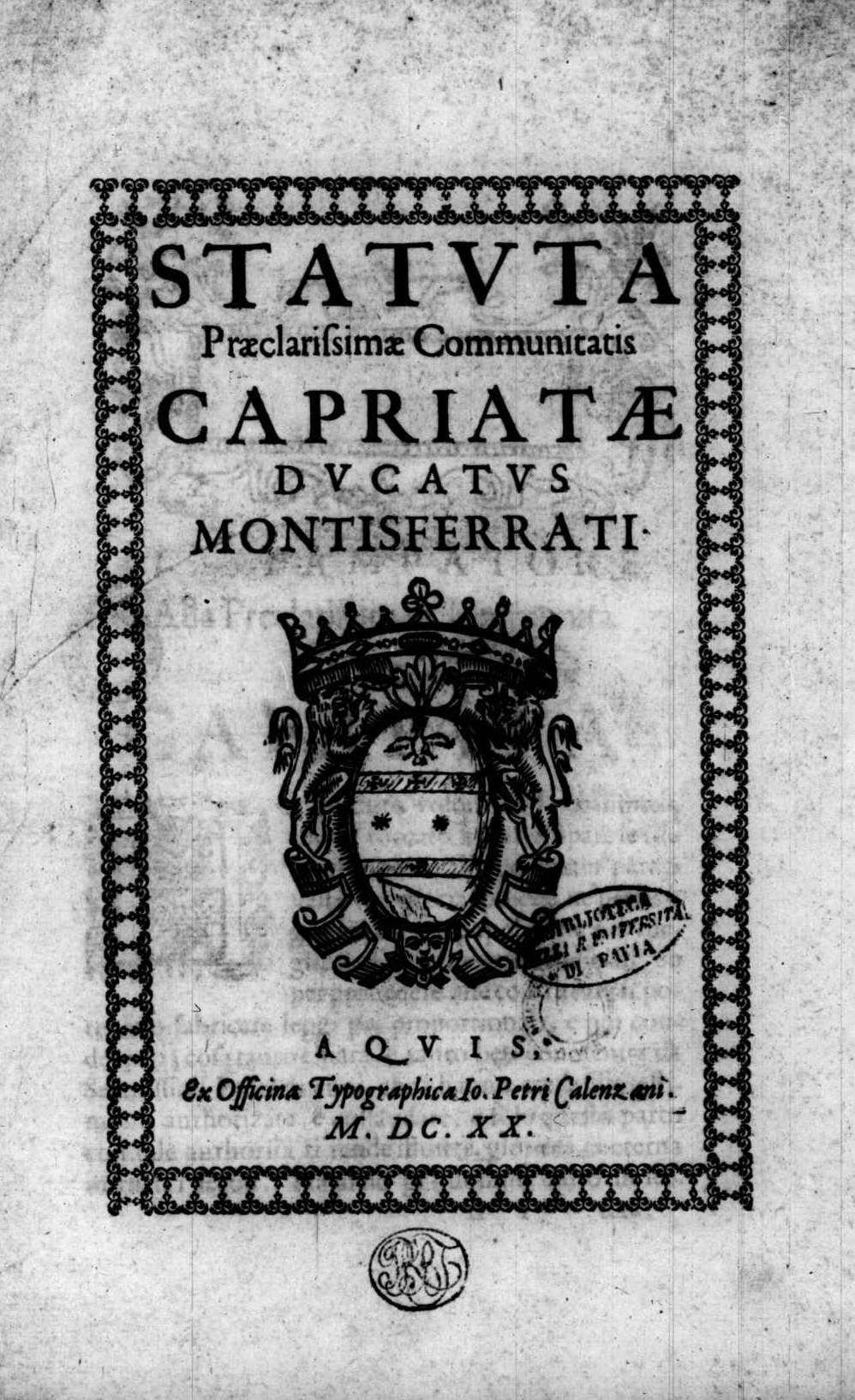 Frontespizio